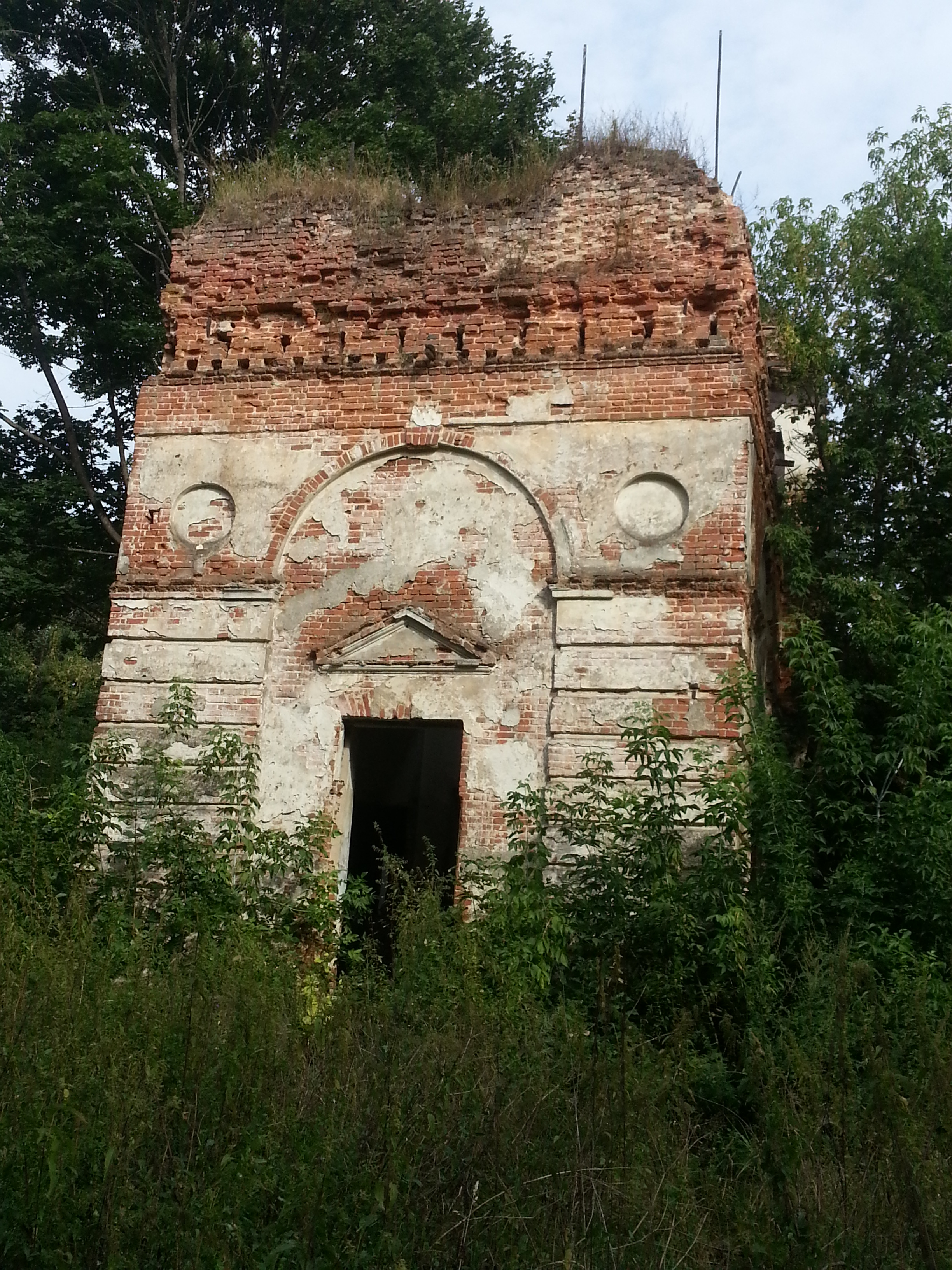 Церковь Вознесения в селе Великий Бор Гордеевского района Брянской области Главный вход